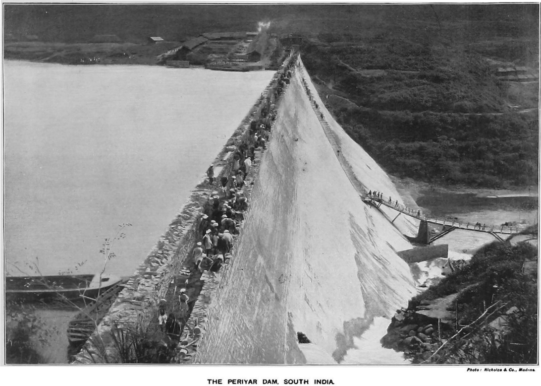 Periyar dam c. 1899